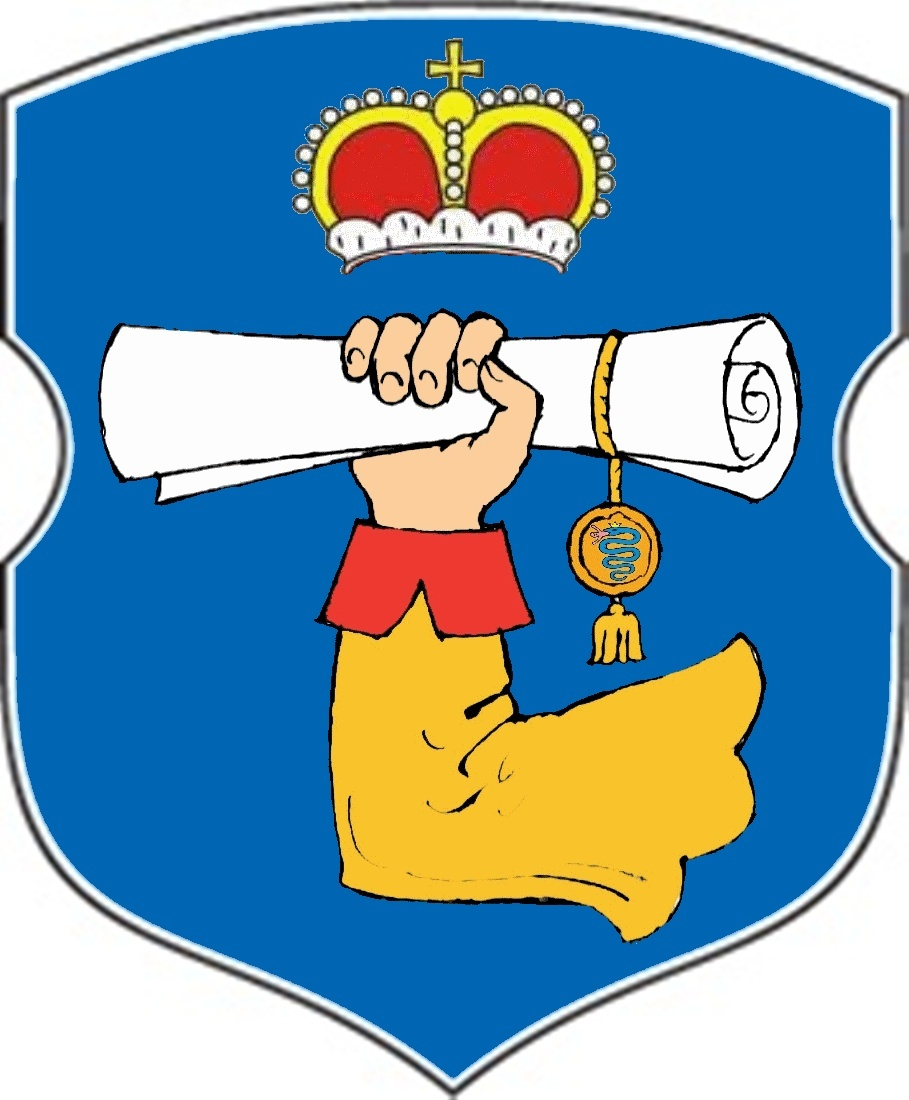 Герб вёскі Моталь